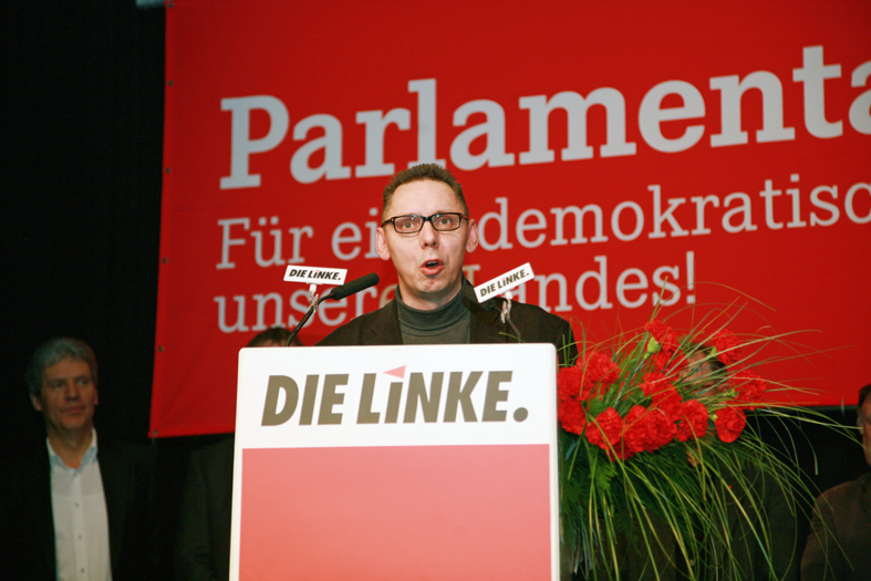 Gernot Klemm bedankt sich. Parlamentariertag der LINKEN in Kiel Abgeordnete aus Fraktionen von Landtagen und dem Bundestag treffen sich im Rahmen der Fraktionsvorsitzendenkonferenz der Linken in Kiel